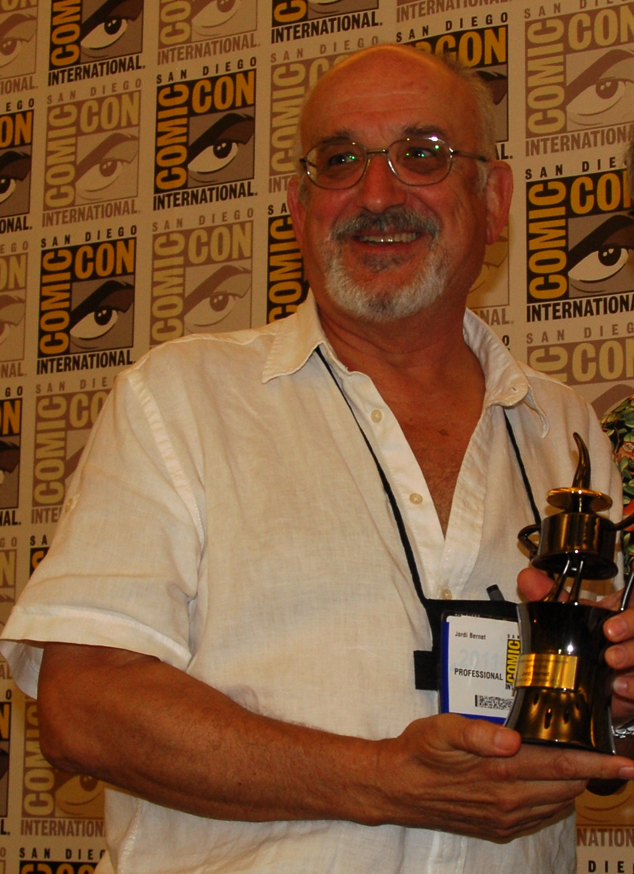 Jordi Bernet receiving the Inkpot award at Comic-Con 2011